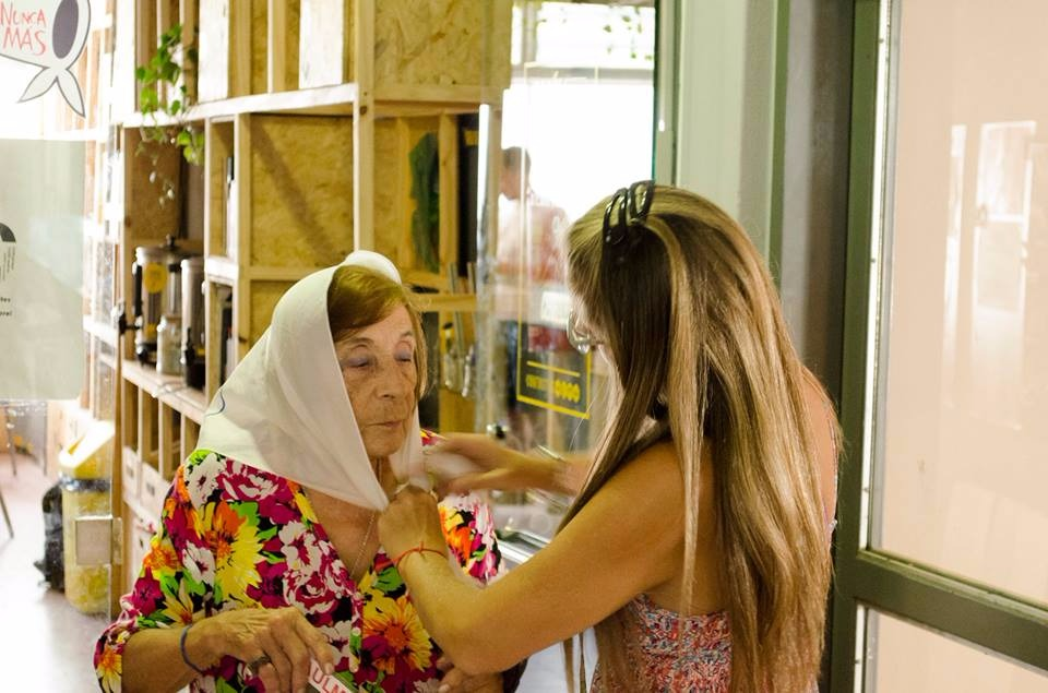 Sara Luján, con su hija Roxana Molina frente al CEADI en las instalaciones de la Facultad de Arquitectura, Urbanismo y Diseño de la UNC.